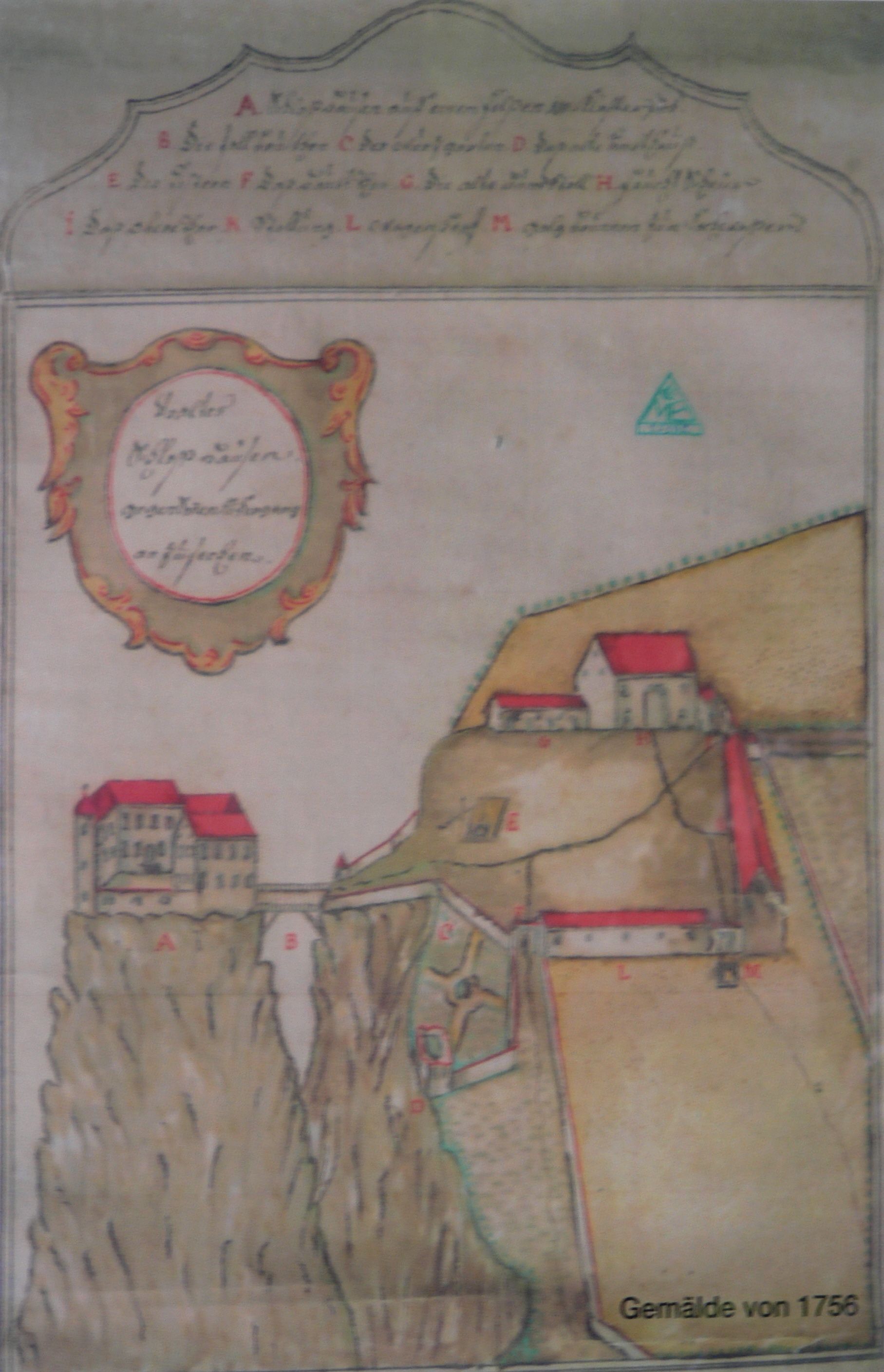 Ruine Hausen (Schloss Hausen im Tal), Gemeinde Beuron, Landkreis Sigmaringen Schloss Hausen 1755